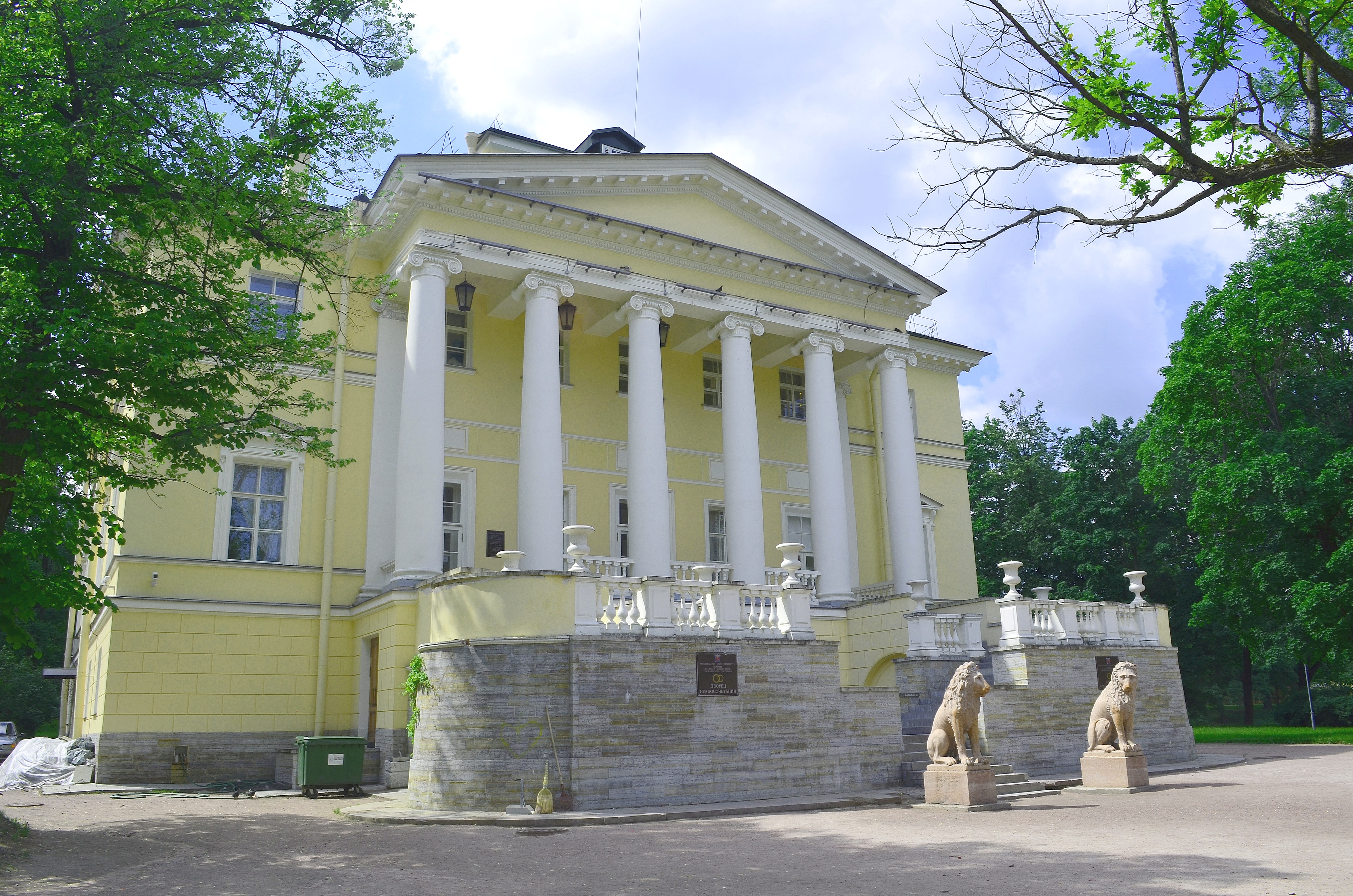 Дом главный (Санкт-Петербург и Лен.область, Пушкин, Садовая улица, 22, Софийский бульв., 2, 4, 6, 8, 10)